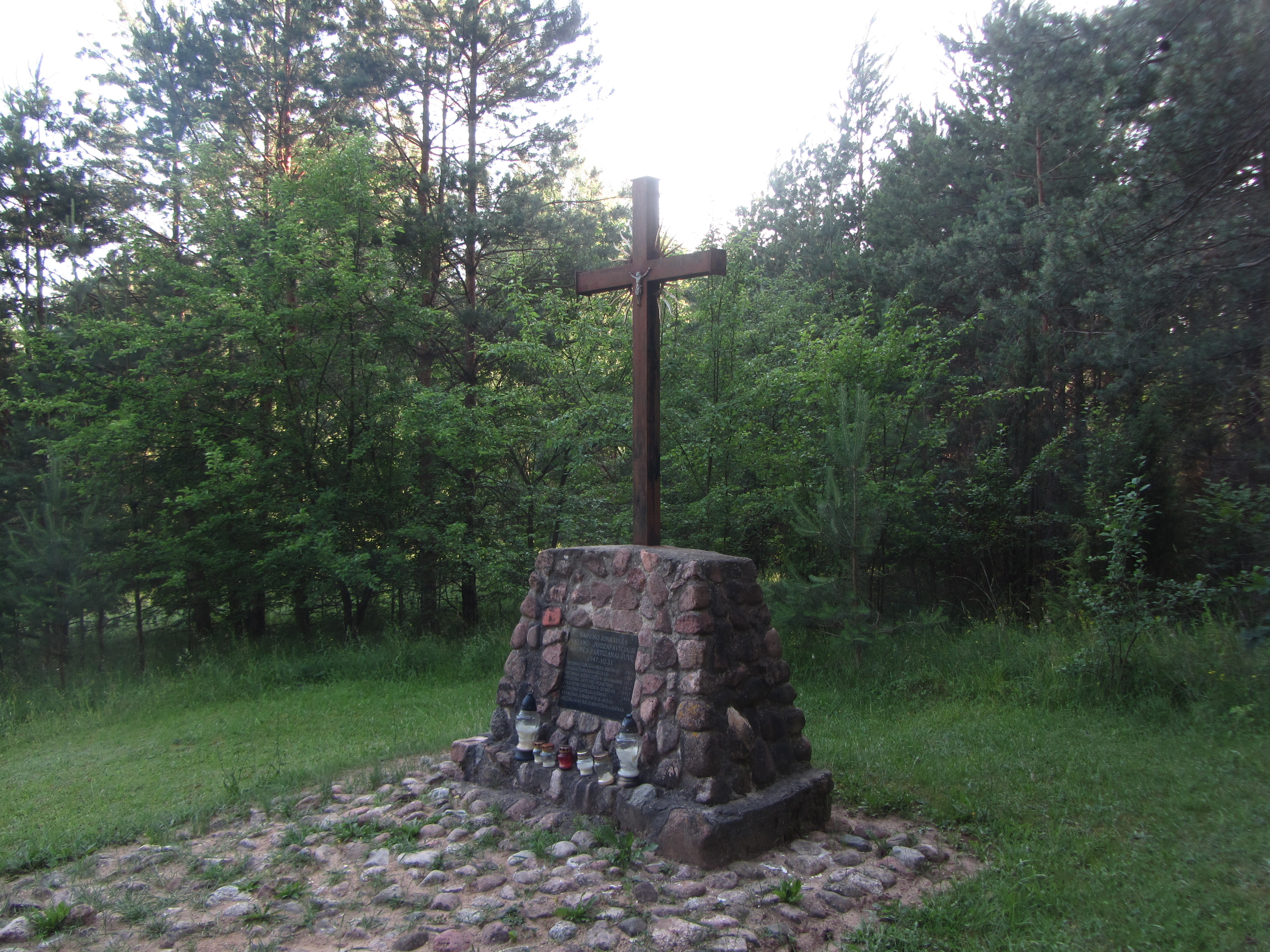 Raitininkų sen., Lithuania